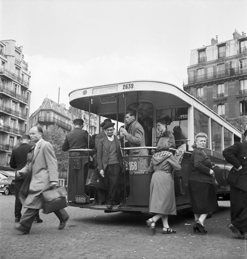 Buss i Paris Photo Nr: 2219-B549 To the museum database (text in swedish)